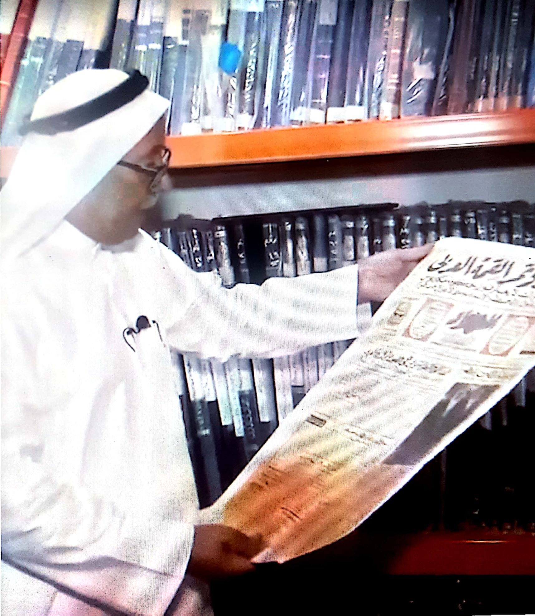 صور